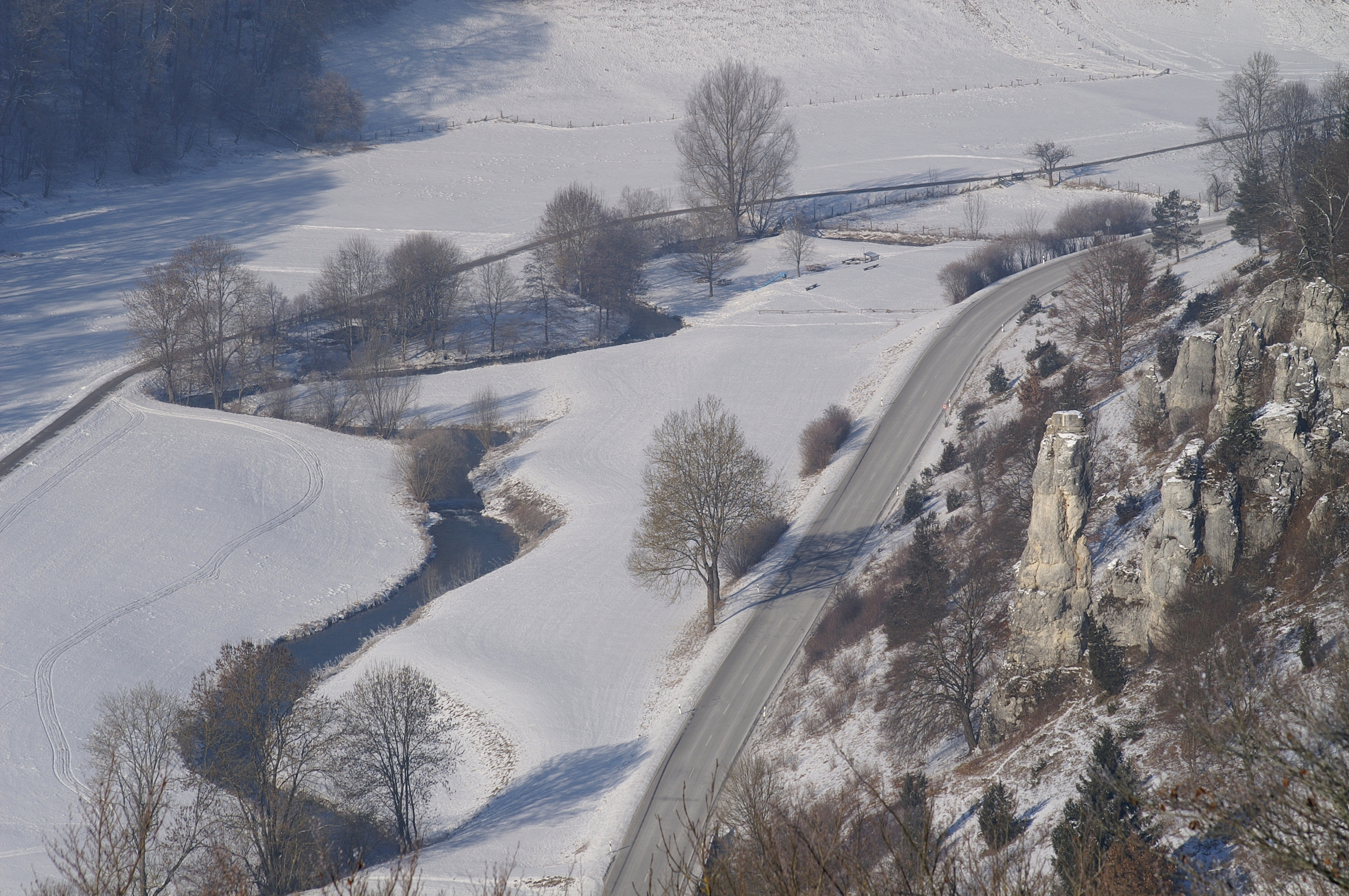 Die Große Lauter vor Gundelfingen